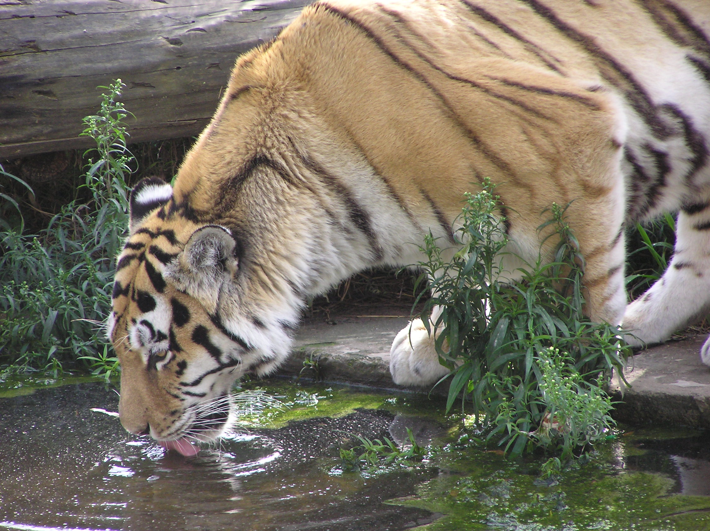 Drinking tiger, Prague ZOO, 2006-09-28.